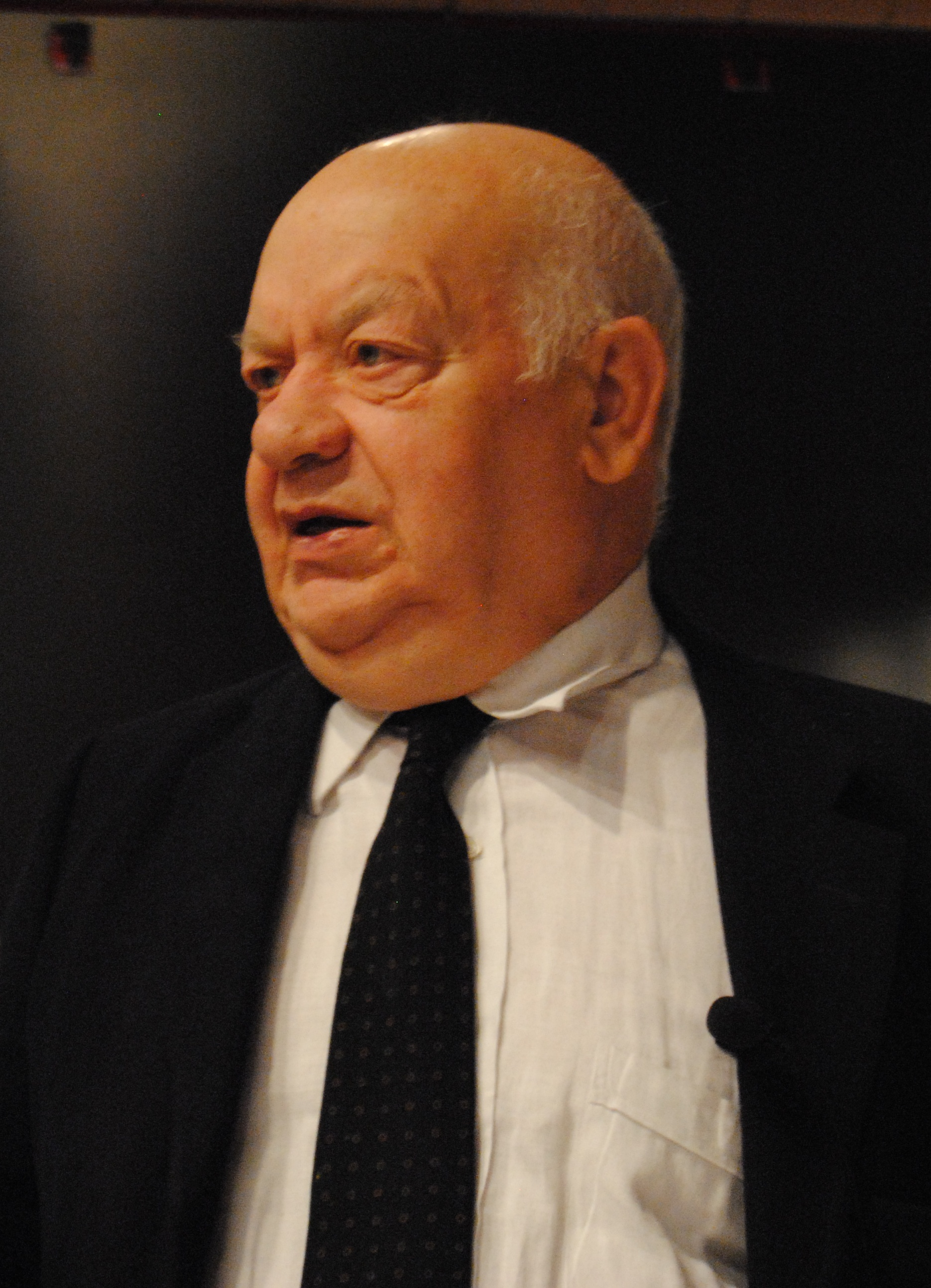 Il prof. Franco Purini all'inaugurazione della mostra "Disegni romani" al Museo della Tecnica Elettrica di Pavia il 25 ottobre 2012